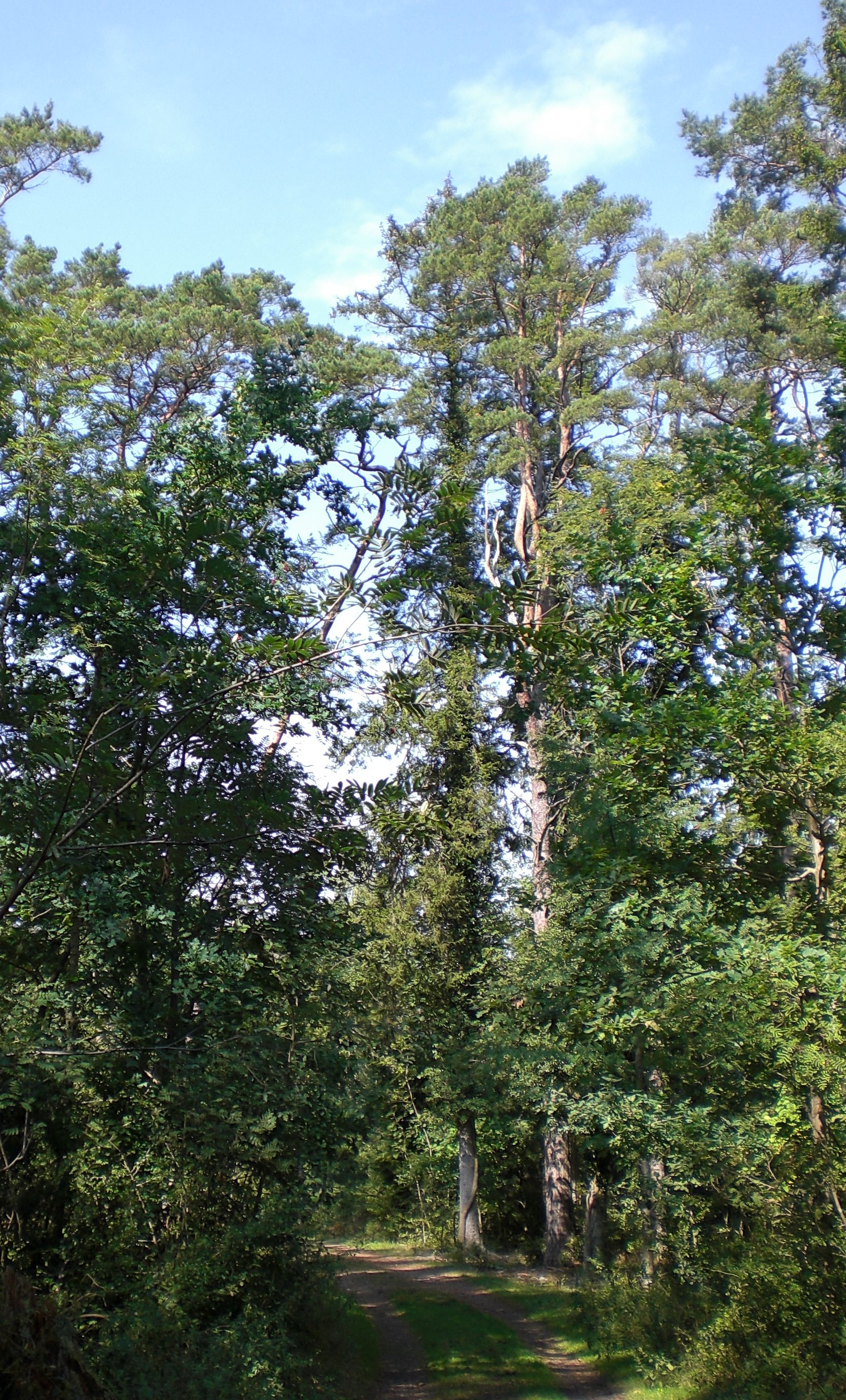 Weg durch den Trollskogen auf Öland, Schweden